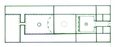 Planta esquemática donde se pueden diferenciar los diferentes espacios del Palacio.